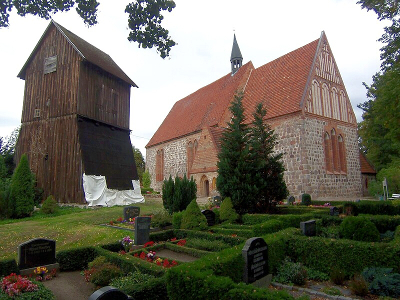 Kirche in Cammin, Landkreis Bad Doberan